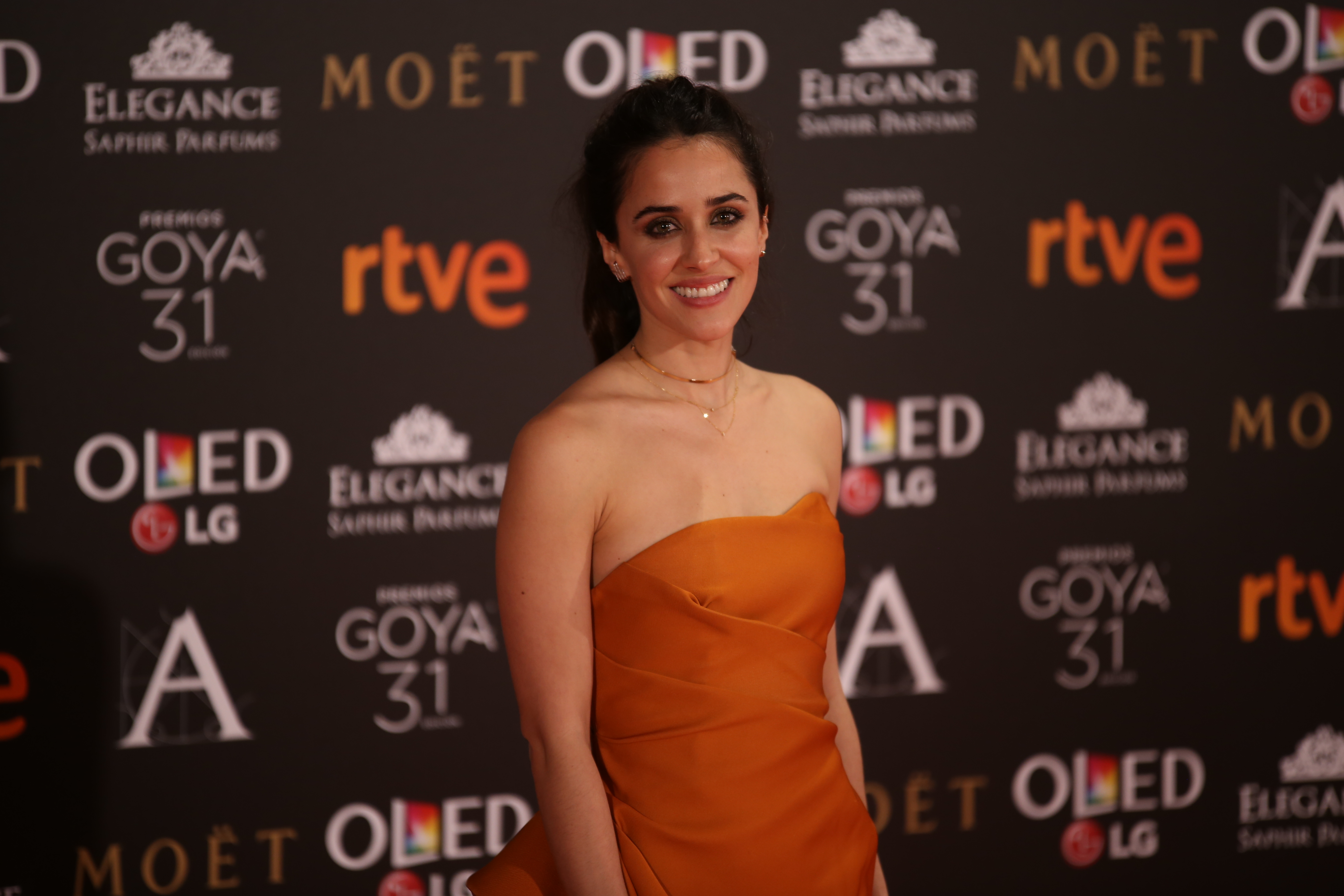 Premios Goya 2017